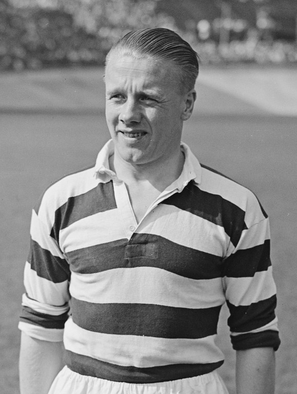 Blauw-Wit-Sparta 3-6, aanvoerder van Blauw-Wit Wim Lakenberg.